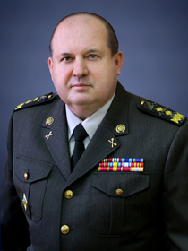 генерал-лейтенант Попко Сергій Миколайович, Командувач Сухопутних військ України